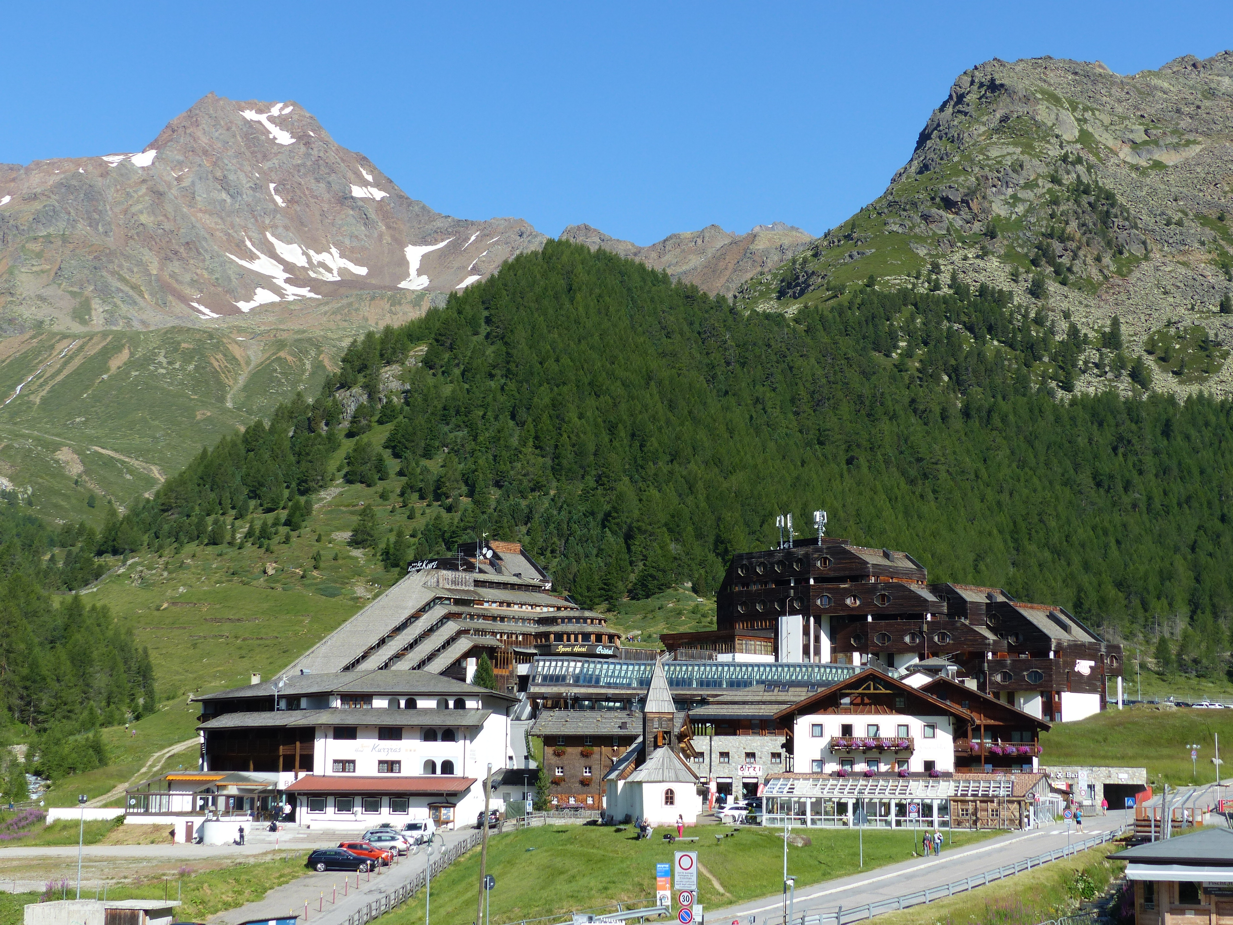 Kurzras: Im Vordergrund die Kapelle von Kurzras